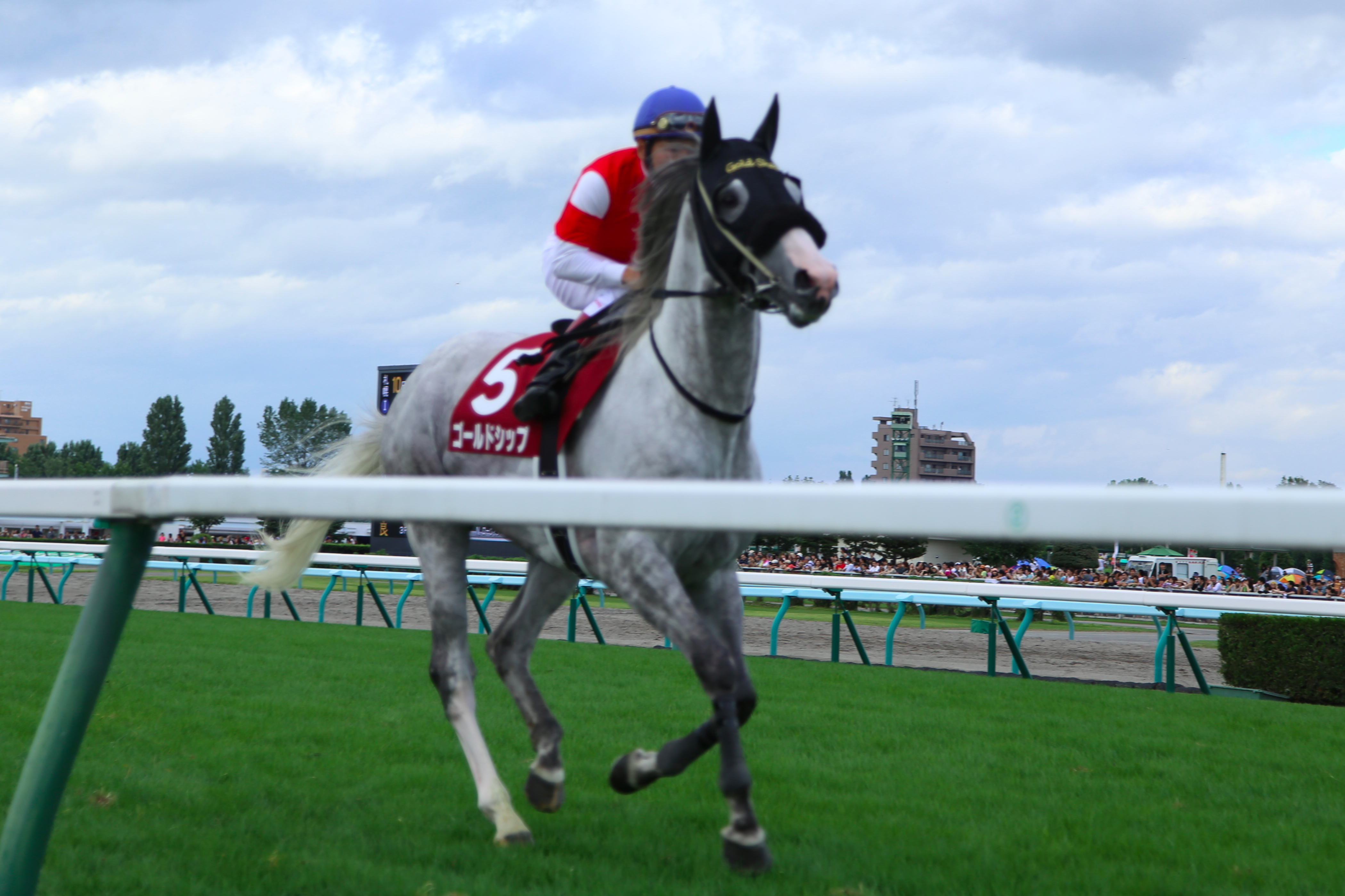 2014年札幌記念でのゴールドシップ